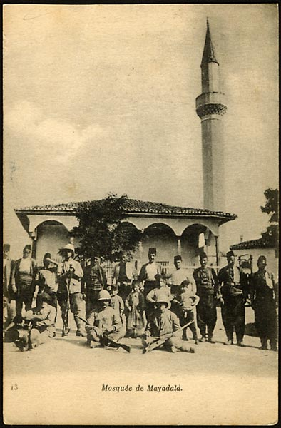 Село Мая даг (Фанос) в началото на 20 век.